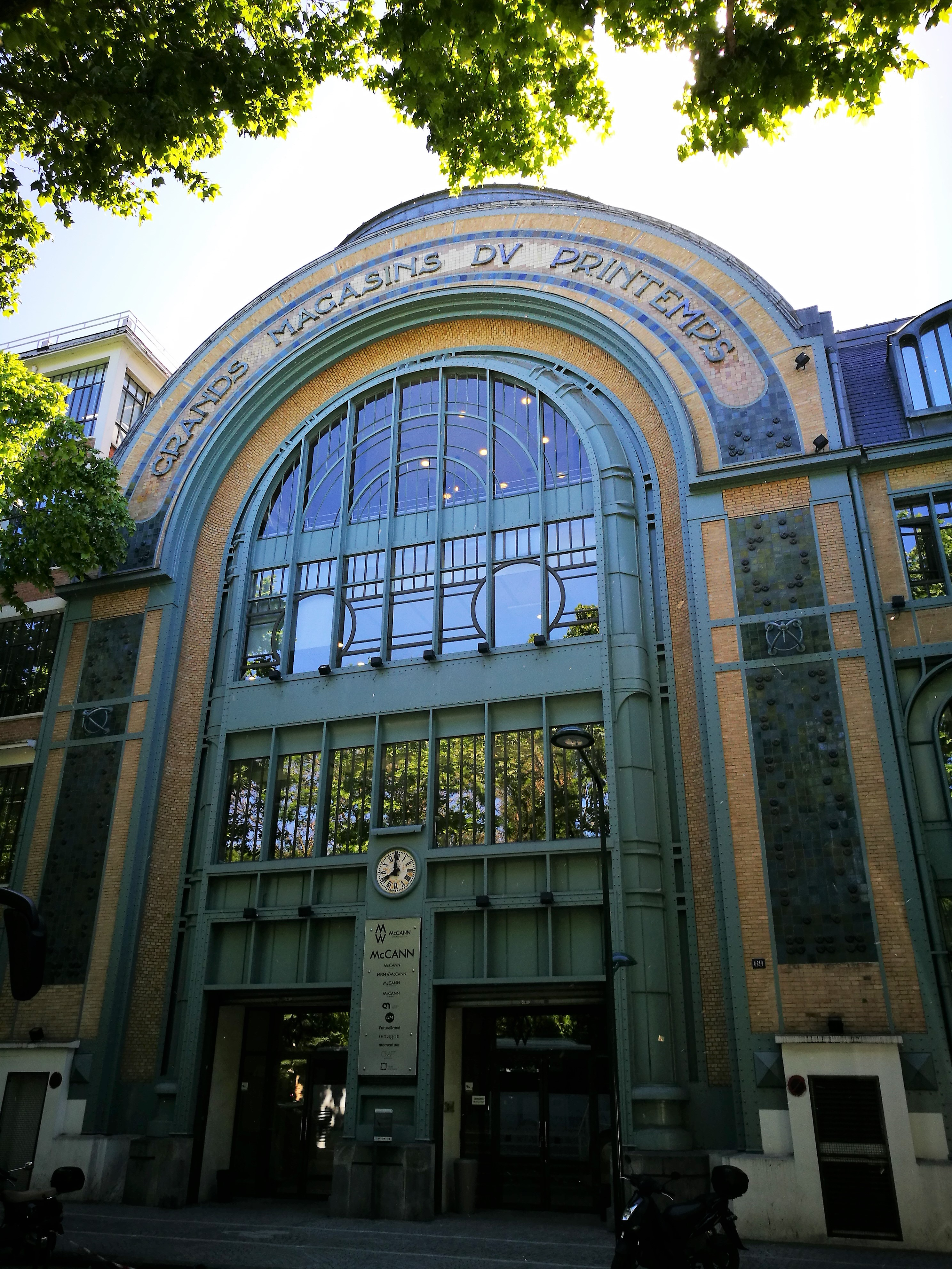 Façade Entrepôt des Grands Magasins du Printemps - Clichy